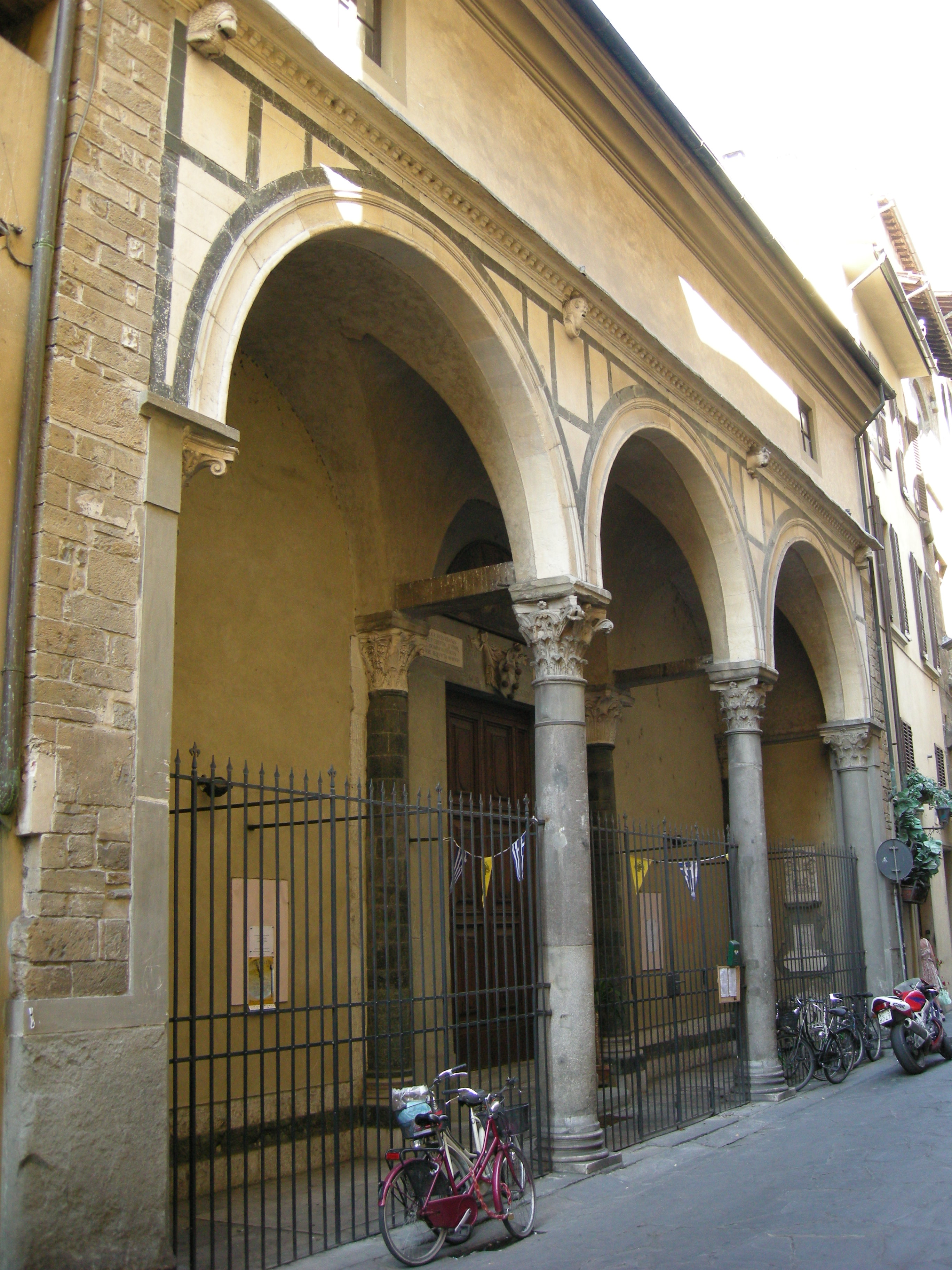 San jacopo soprarno, portico